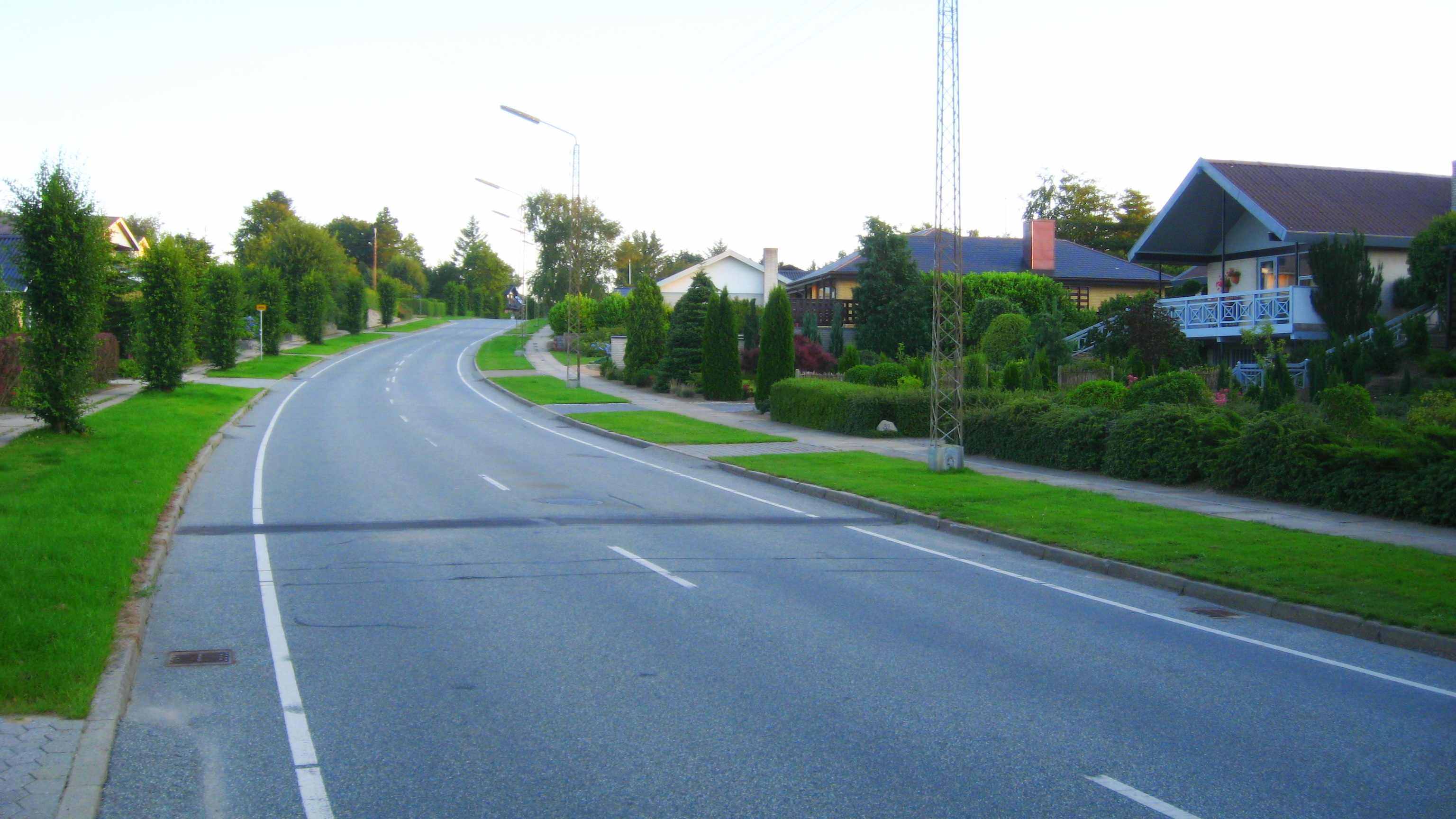 Ulvegravene, bebyggelse i Hjørrings sydvestlige udkant (Sankt Hans Sogn), præget af parcelhusbyggeri fra 1970'erne og 1980'erne.